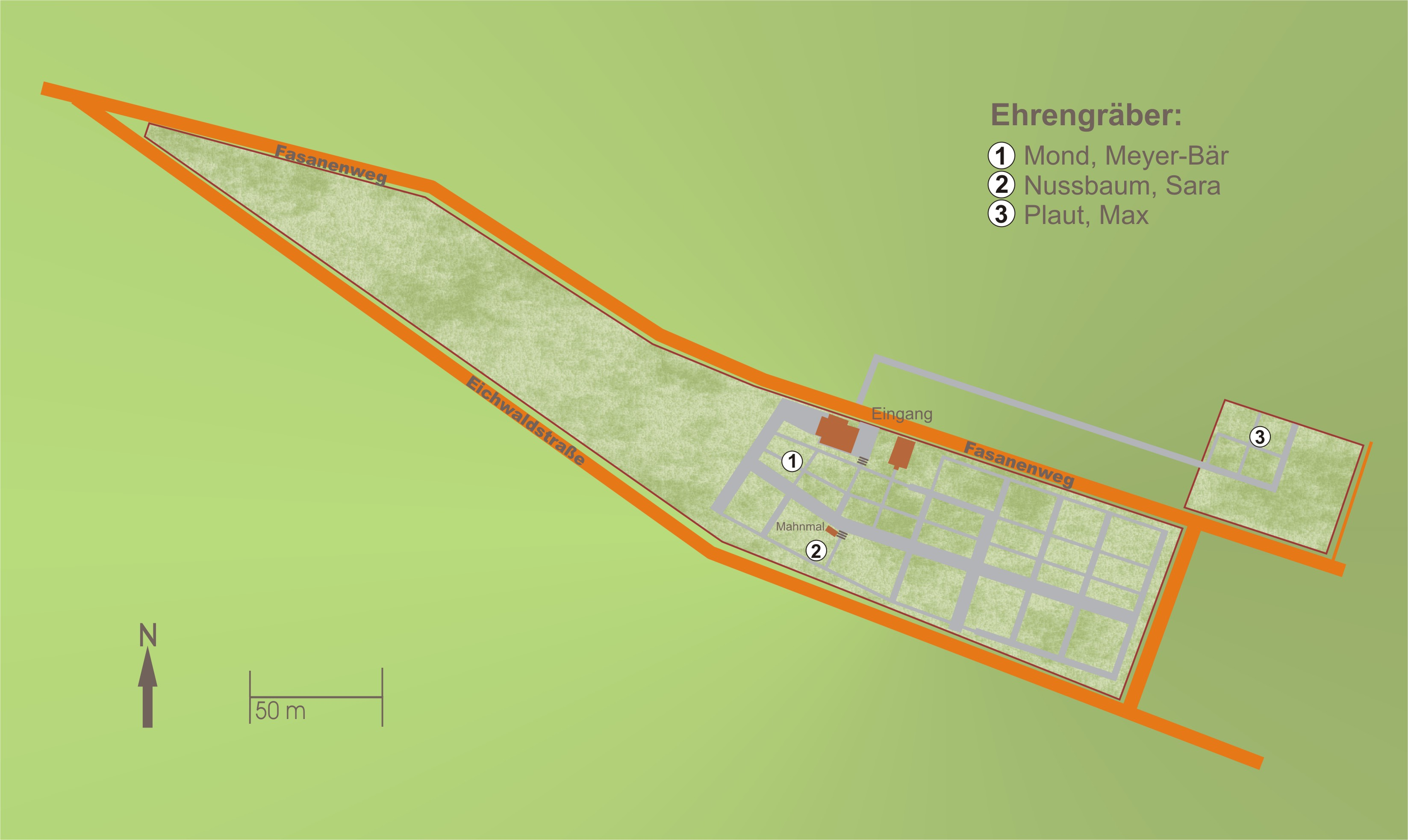 Plan des Israelischen Friedhofs (alter und neuer Teil) in Kassel-Bettenhausen (Deutschland)